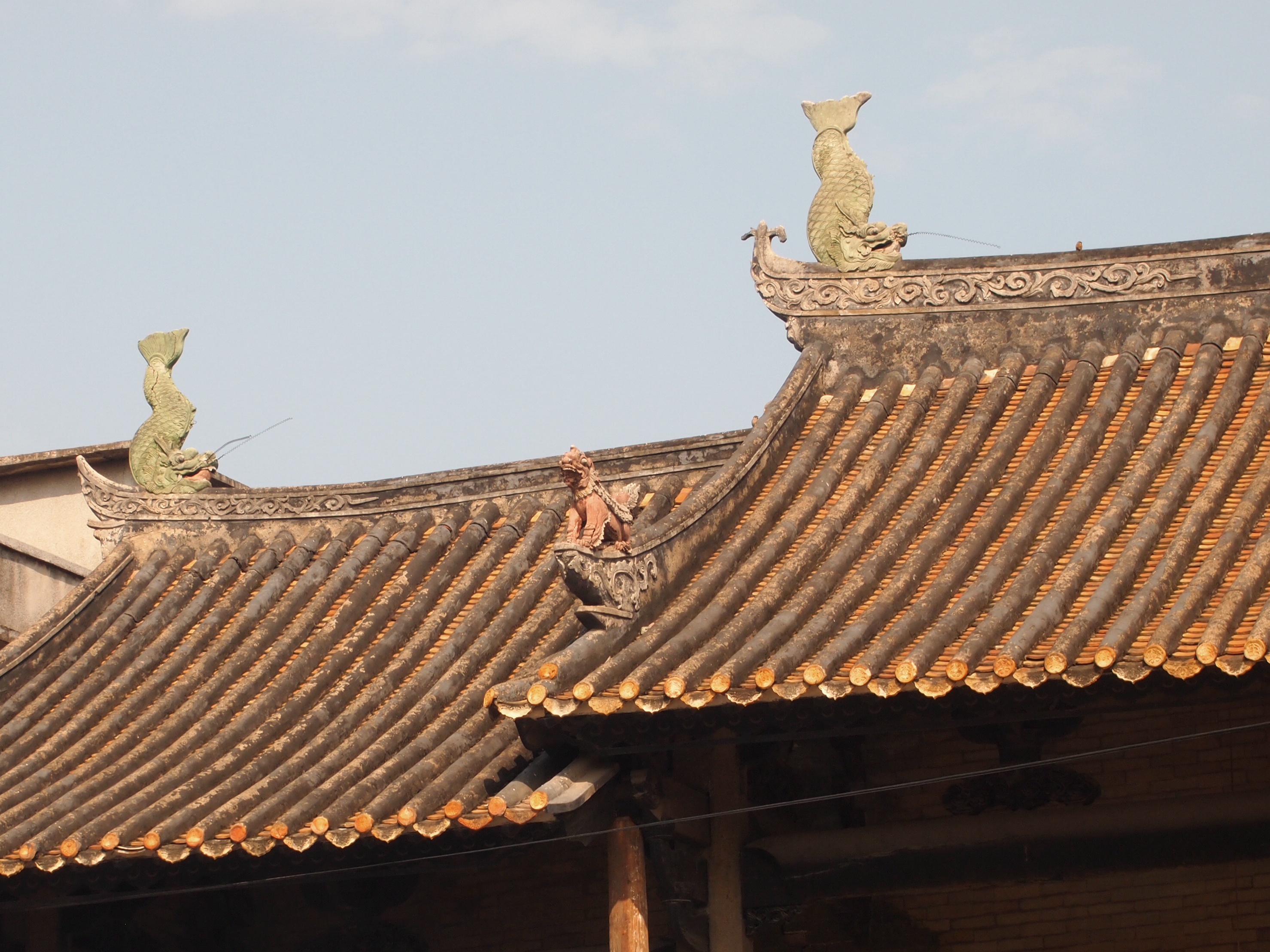 瀝滘衛氏大宗祠頭門脊飾